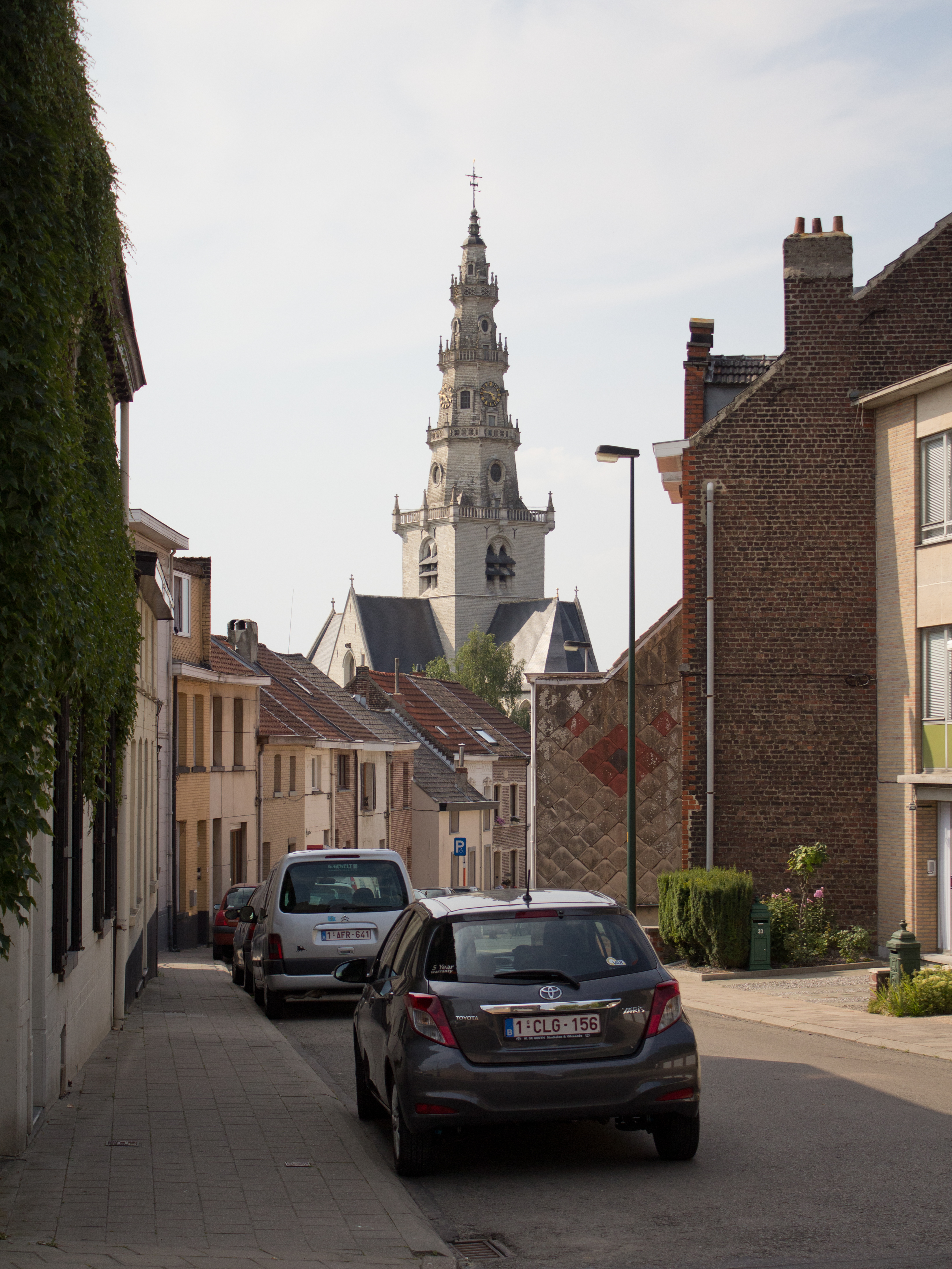 Parochiekerk Sint-Katarina en Sint-Cornelius, Diegem.